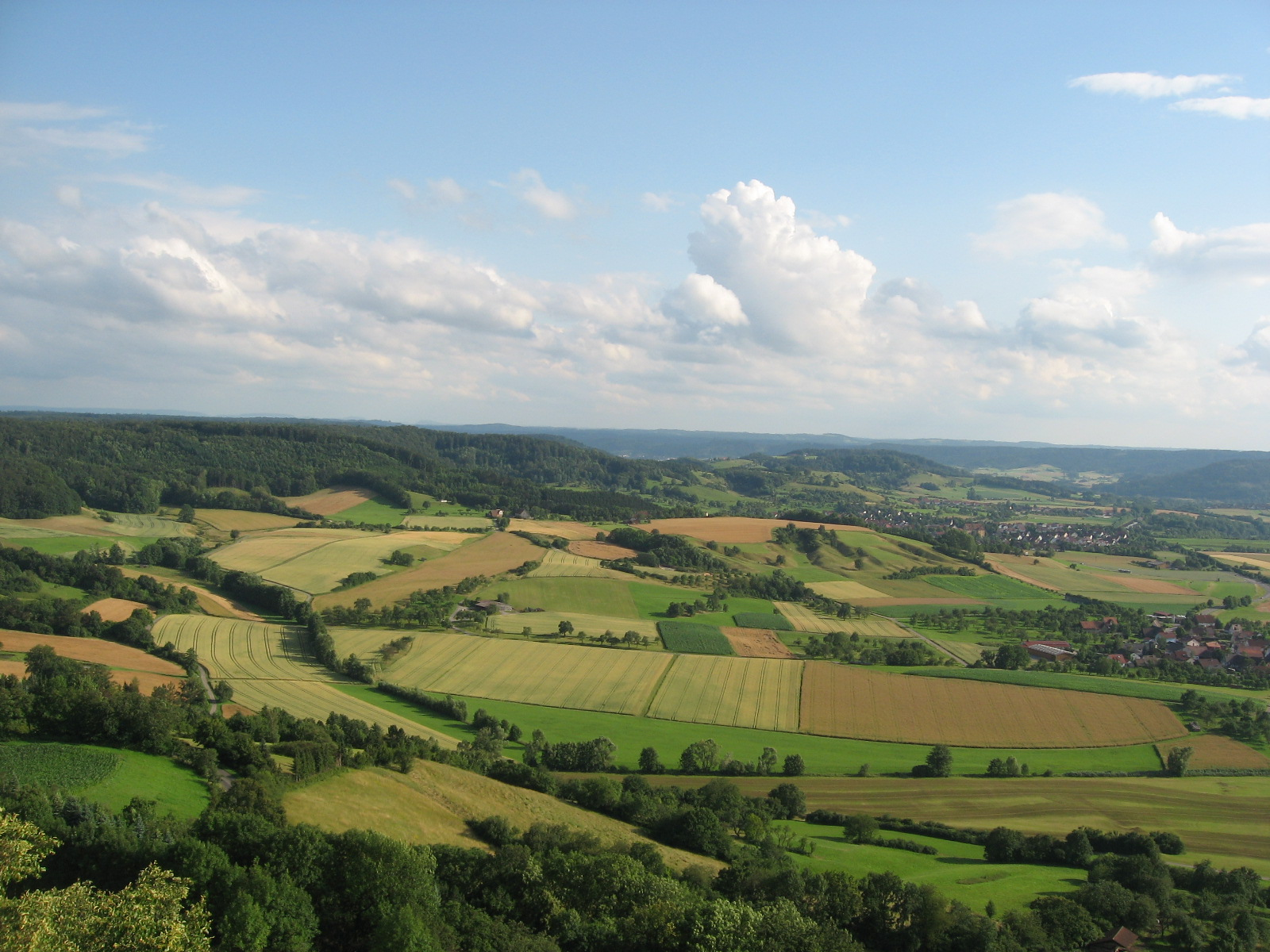 Blick vom Turm auf dem Einkorn bei Schwäbisch Hall-Hessental über die weite Talmulde des Remsbachs nach S. Am rechten Bildrand Michelbach an der Bilz-Rauhenbretzingen, etwas links am Waldrand auf dem ersten Hügel der Michelbacher Hagenhof, dahinter größtenteils verdeckt Michelbach selbst. Dahinter erhebt sich unter der hohen Cumulus-Wolke noch vor dem dunstigen Horizont das kleine Bergmassiv aus Buchhorn und Adelberg.